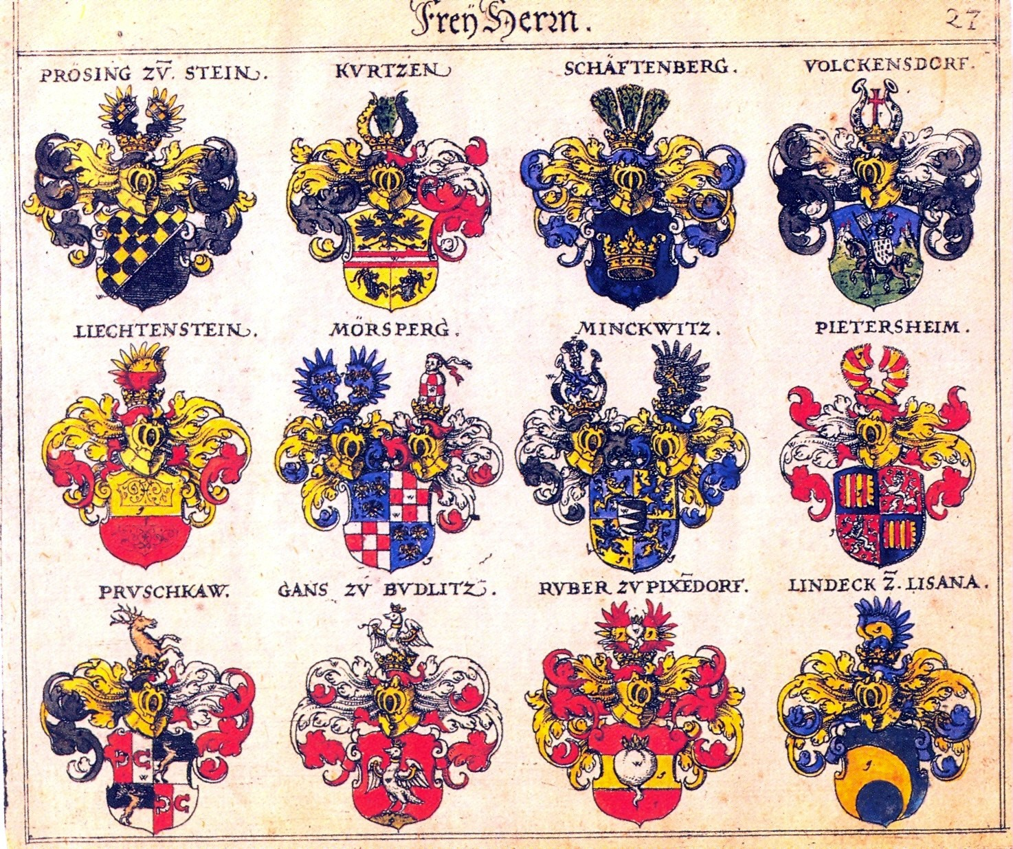 Johann Siebmacher: New Wappenbuch eingescannt aus: Horst Appuhn (Hrsg.), Johann Siebmachers Wappenbuch. Die bibliophilen Taschenbücher 538, 2. verb. Aufl , Dortmund 1989 Freiherren Blatt 27